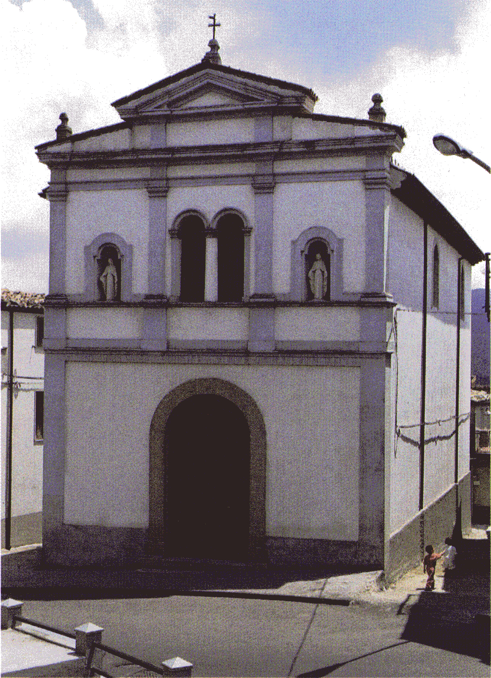 Facciata della Chiesa negli anni '80